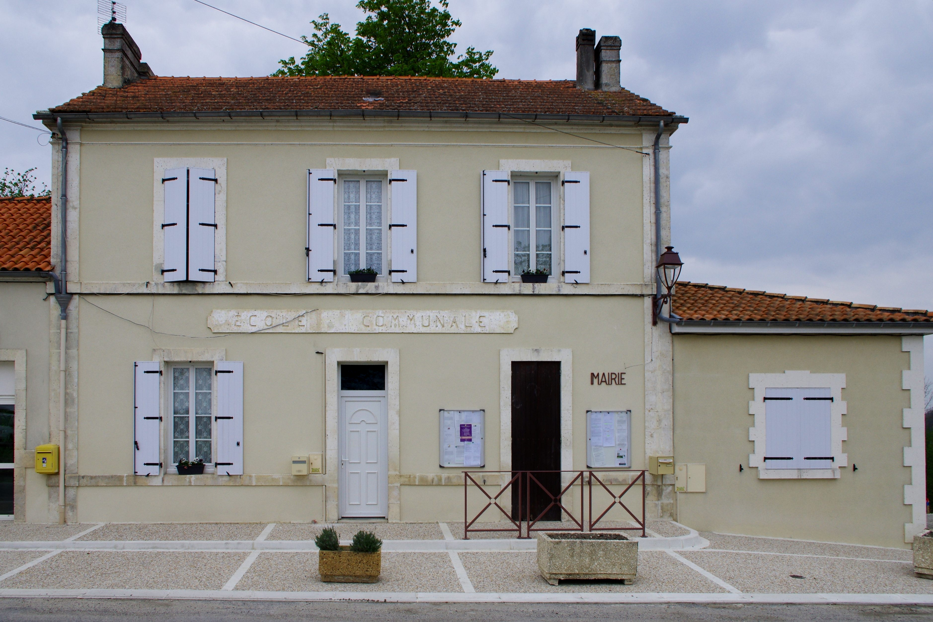 La mairie de Sainte-Souline, Charente, France.